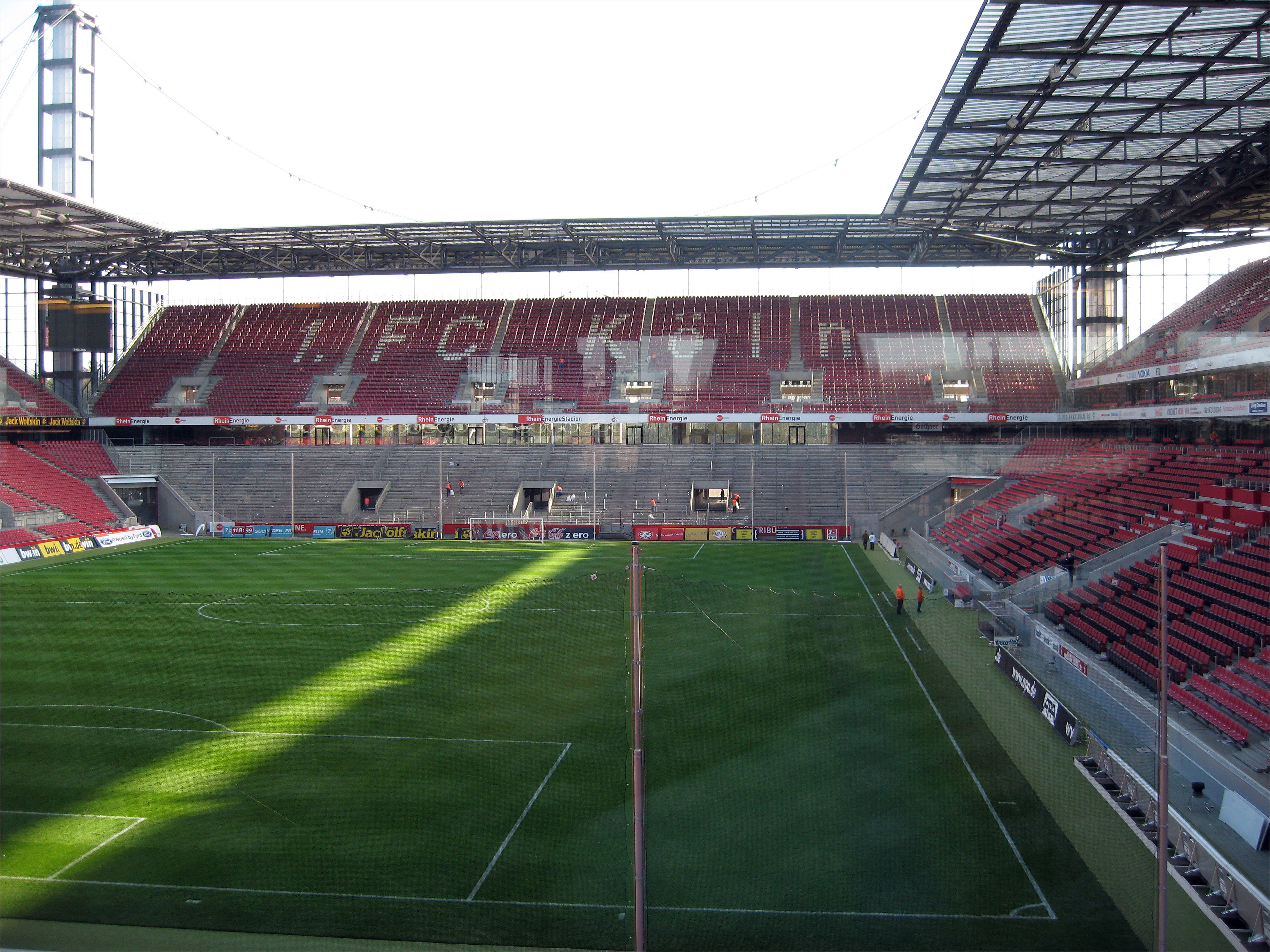 RheinEnergieStadion, 1. April 2007